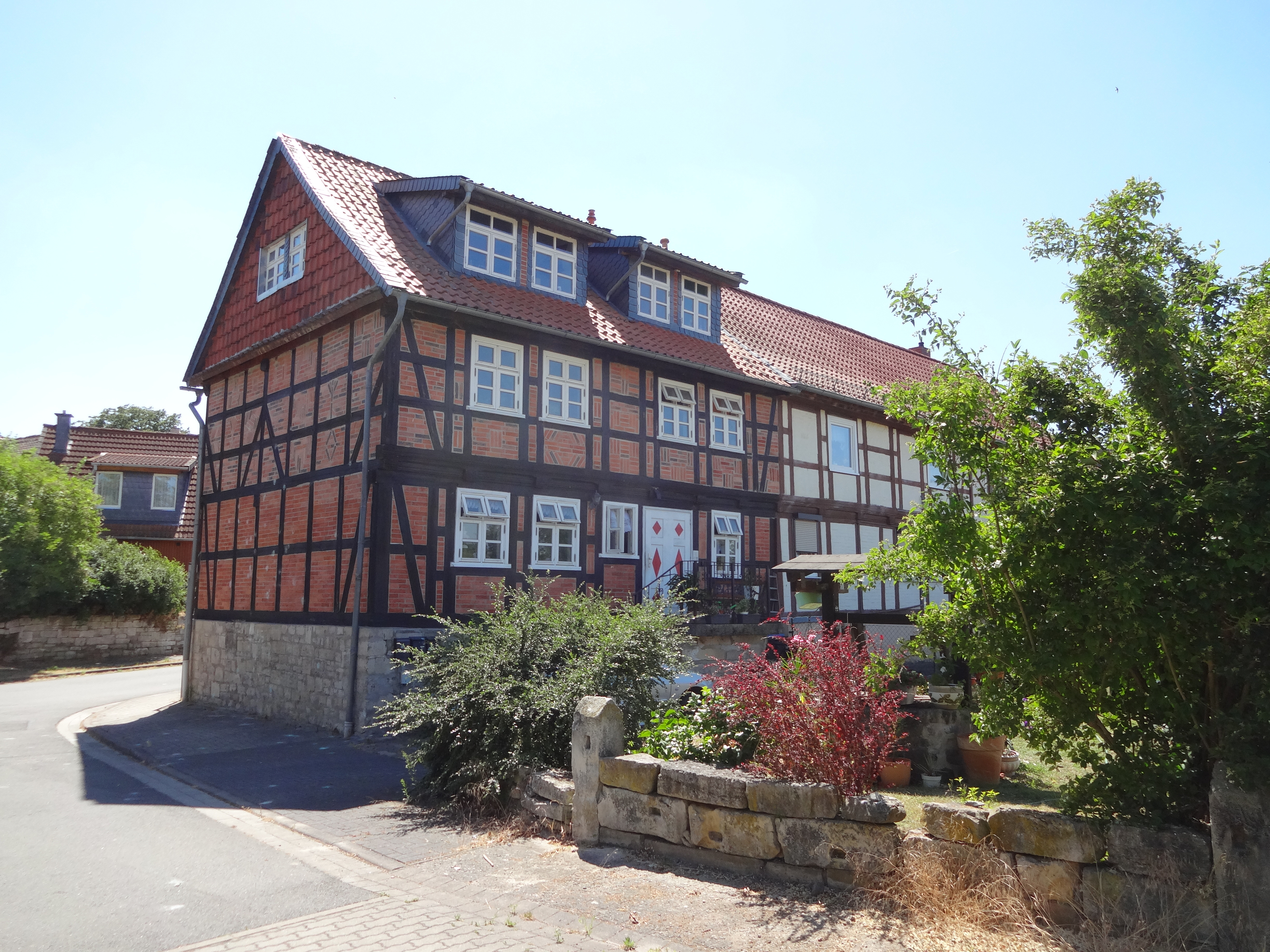 denkmalgeschütztes Wohnhaus in der Hinterstraße 1 in Dedeleben